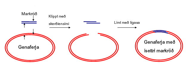 Klonierung eines PCR-Produkts in einen Vektor Ersteller: Andymuc